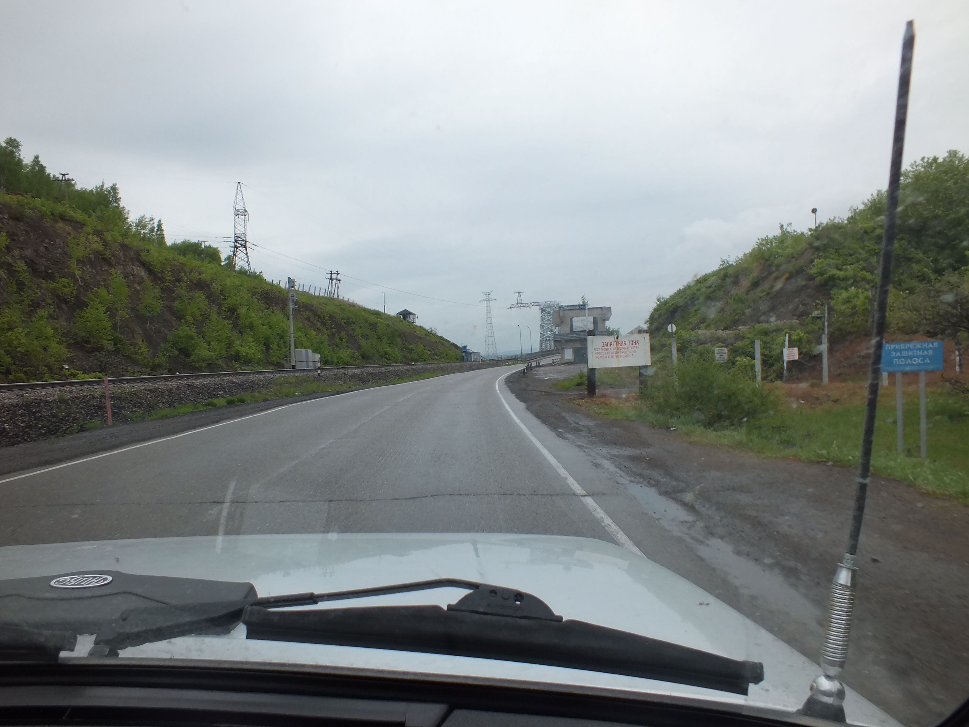 Road-rail bridge over Amur River near Komsomolsk-on-Amur